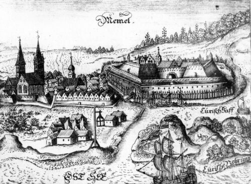 Klaipėda castle in 1684